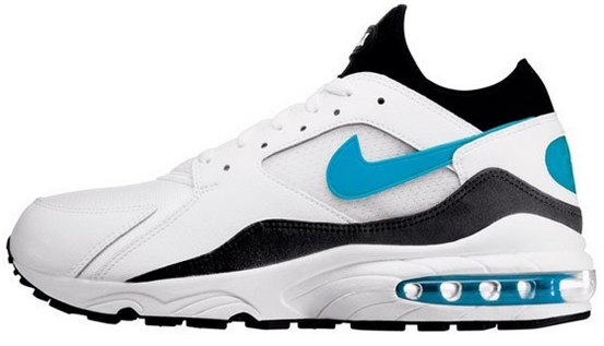 Nike Air Max '93